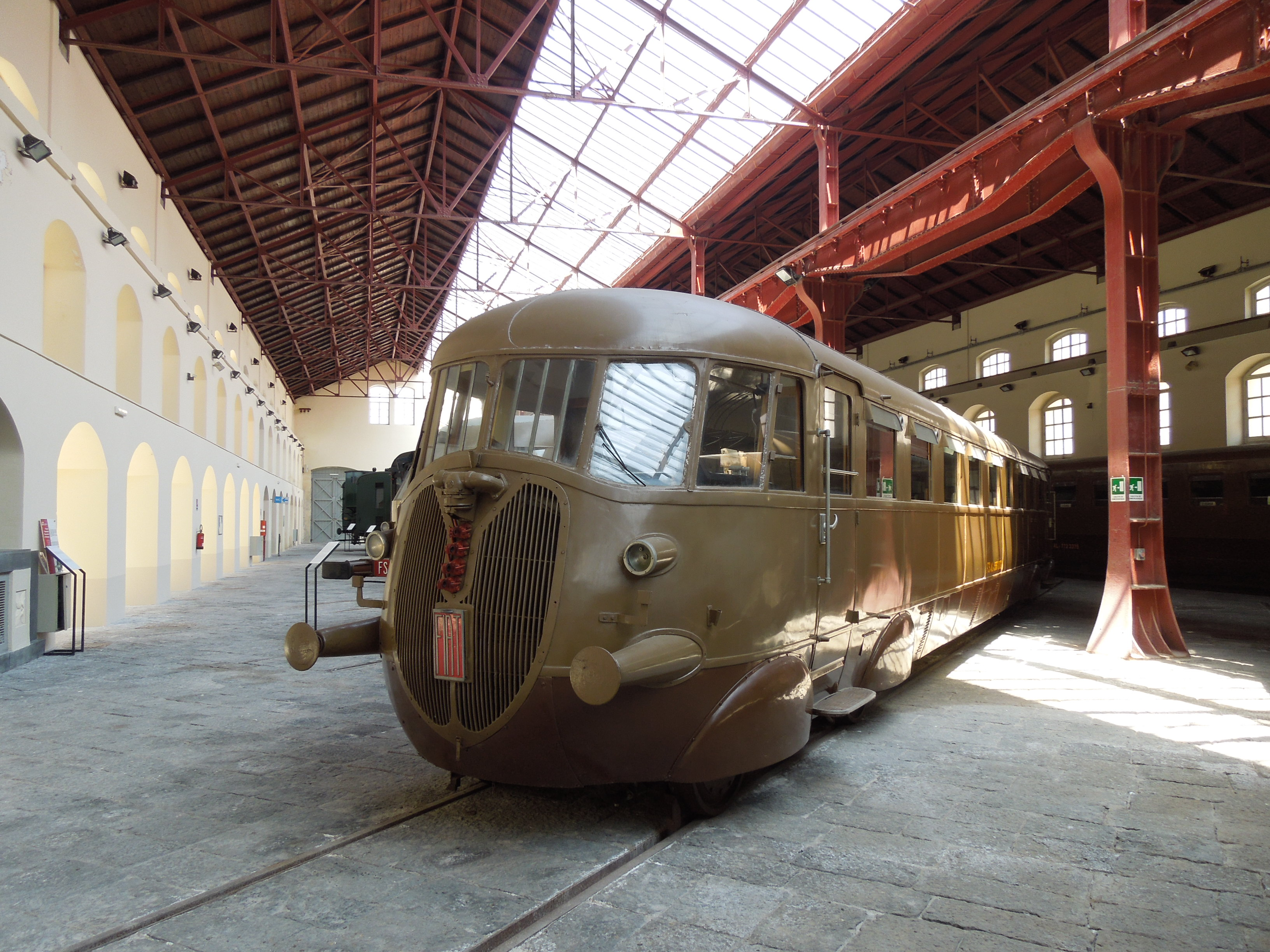 A Pietrarsa vasúttörténeti múzeum